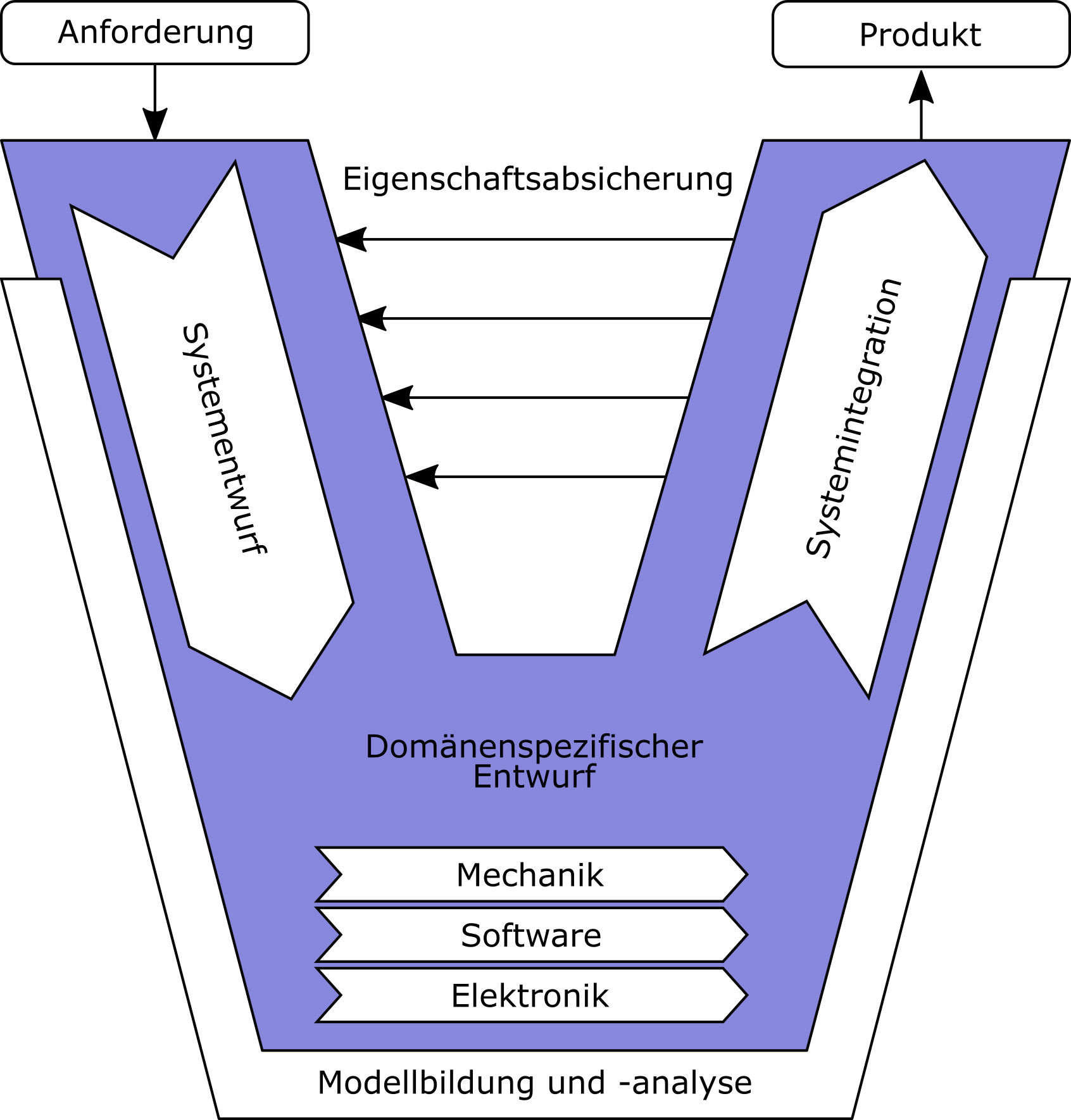 V-Modell nach Richtlinie VDI 2206.